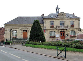 Façade de la mairie de Ressons-sur-Matz